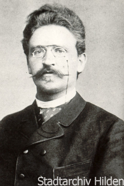 schwarz-weiße Aufnahme